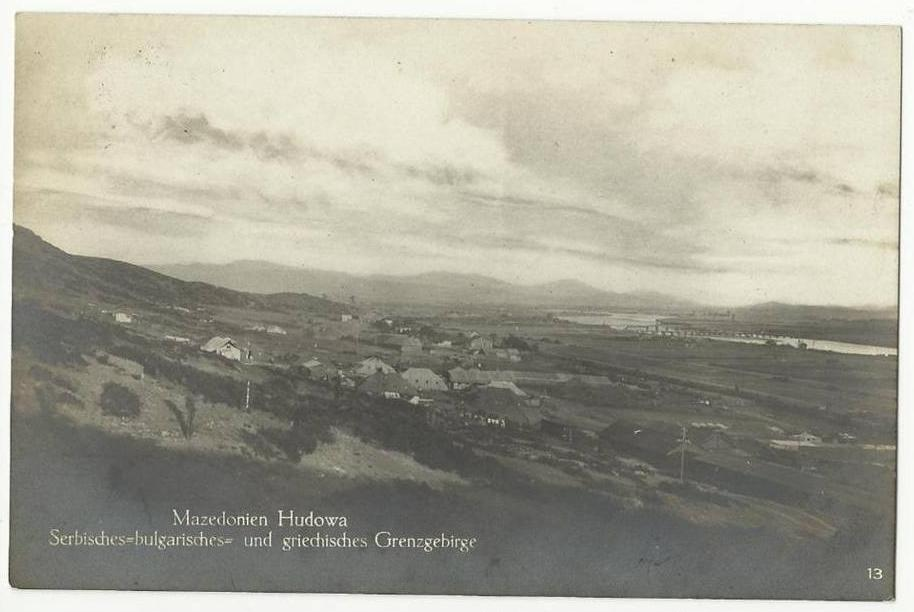 Удово през Първата световна война